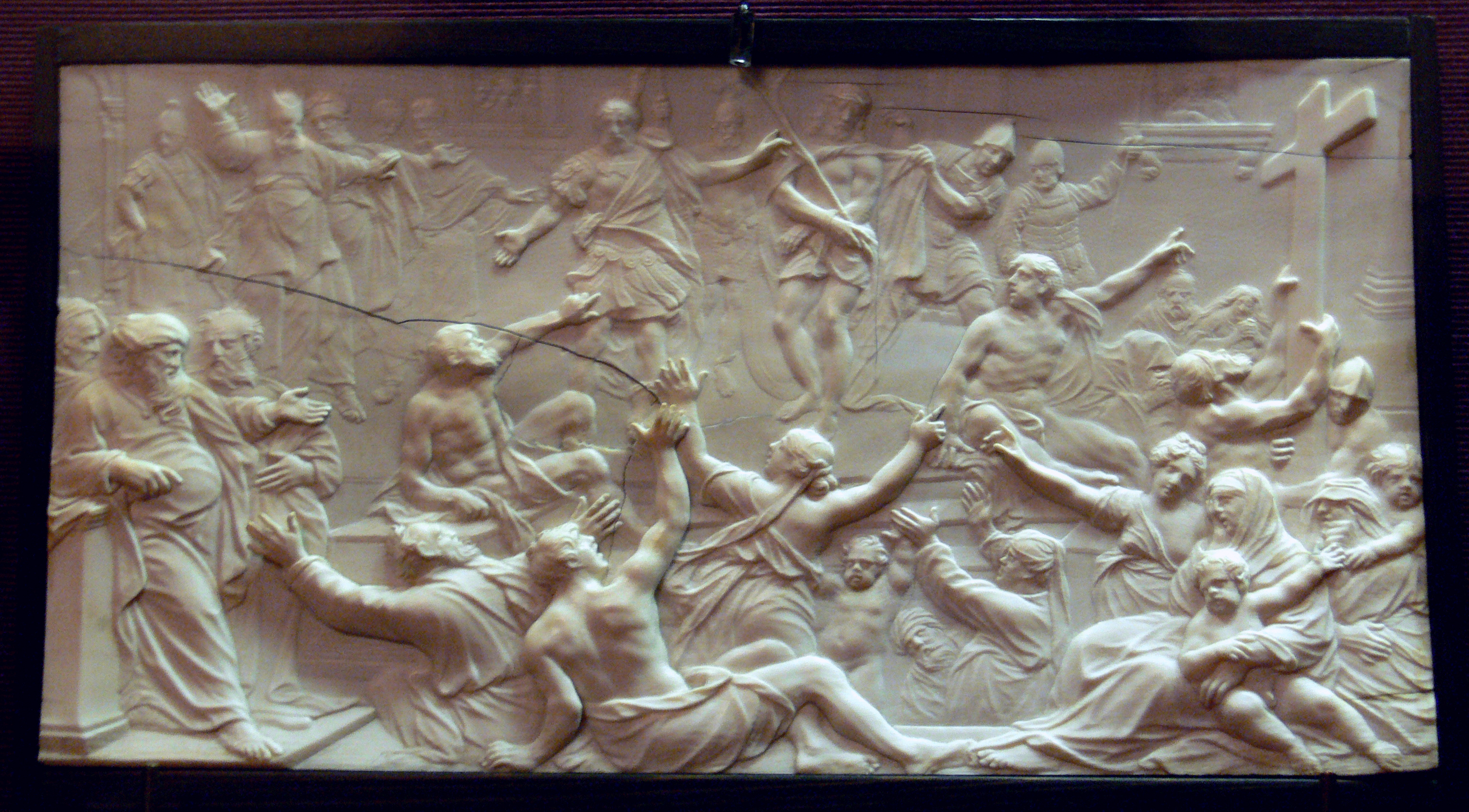 Magnus Berg: Ecce Homo; Kopenhagen, 1721?; Elfenbein; Wien, Schatzkammer, Inv. Nr. D 201